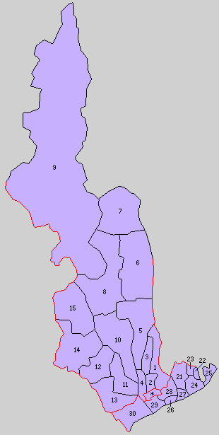 静岡県安倍郡の町村。